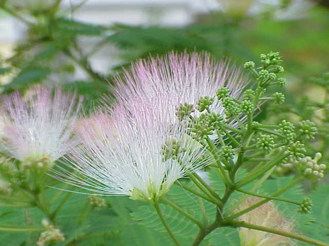 Species: Albizia julibrissin Family: Mimosaceae Image No. 6